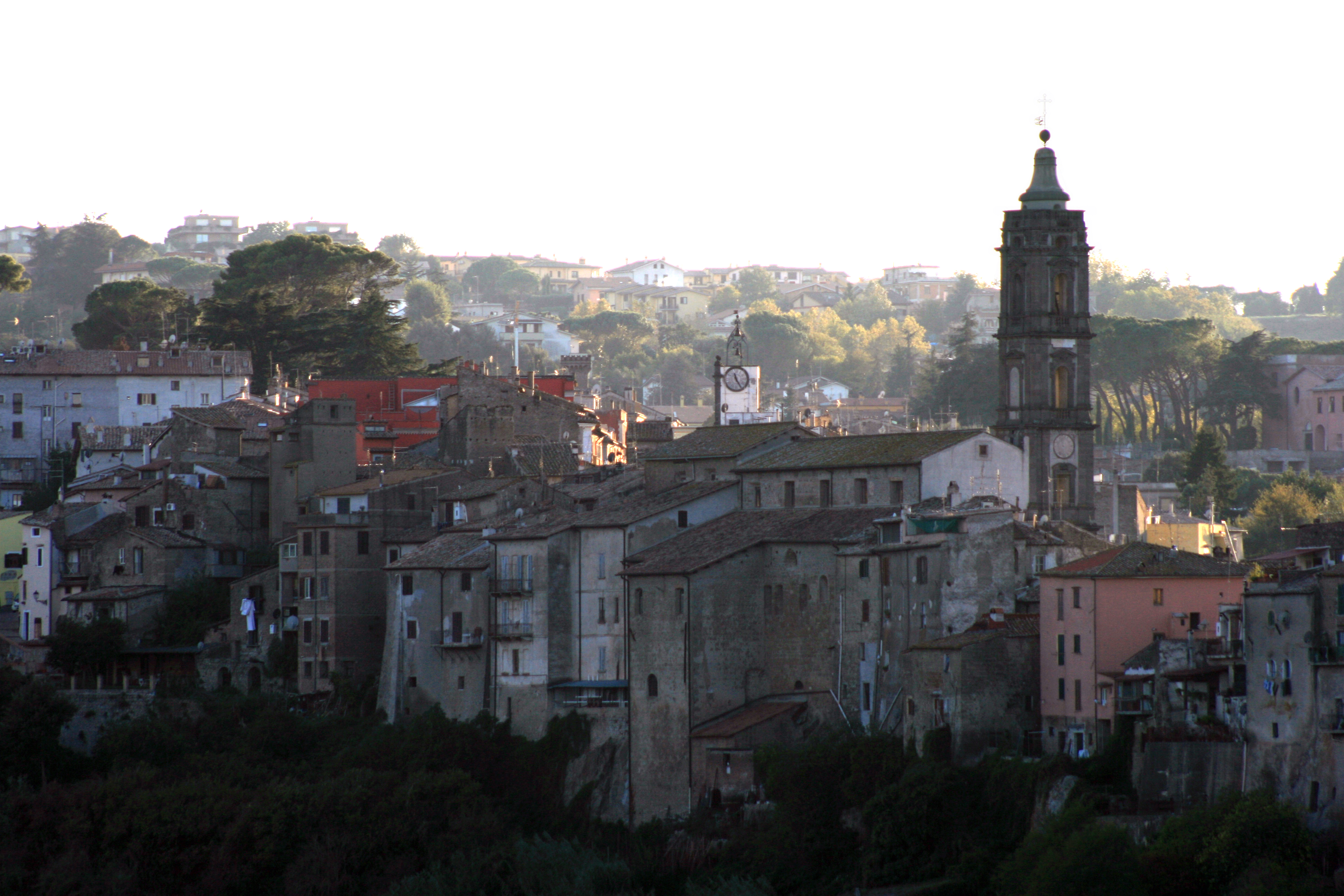 Veduta del borgo medioevale di Campagnano di Roma.